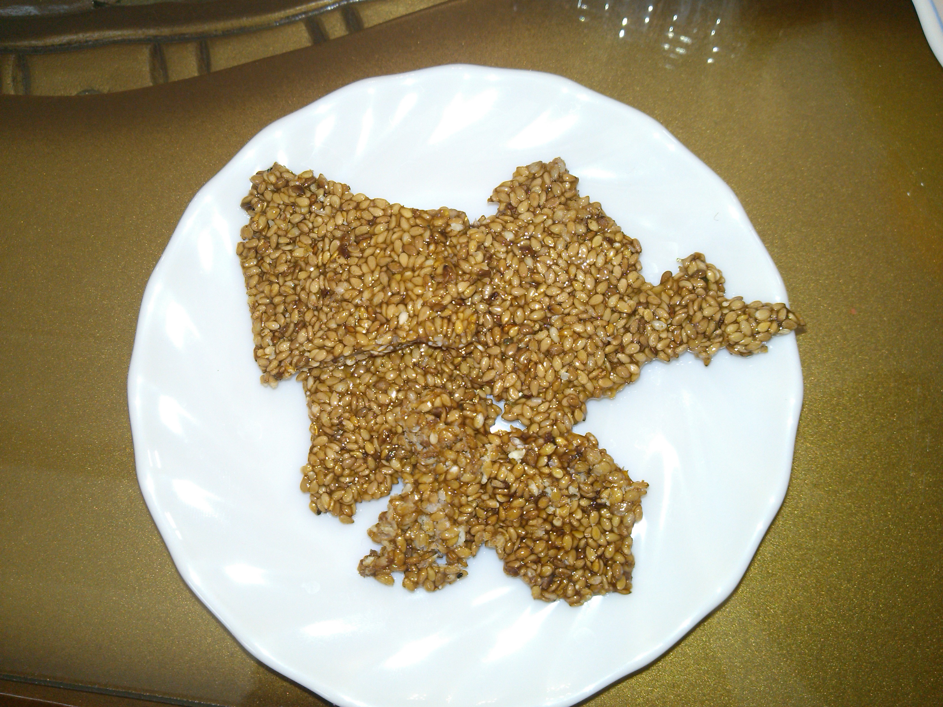 پشت زیک، نوعی شیرینی سنتی مازندرانی